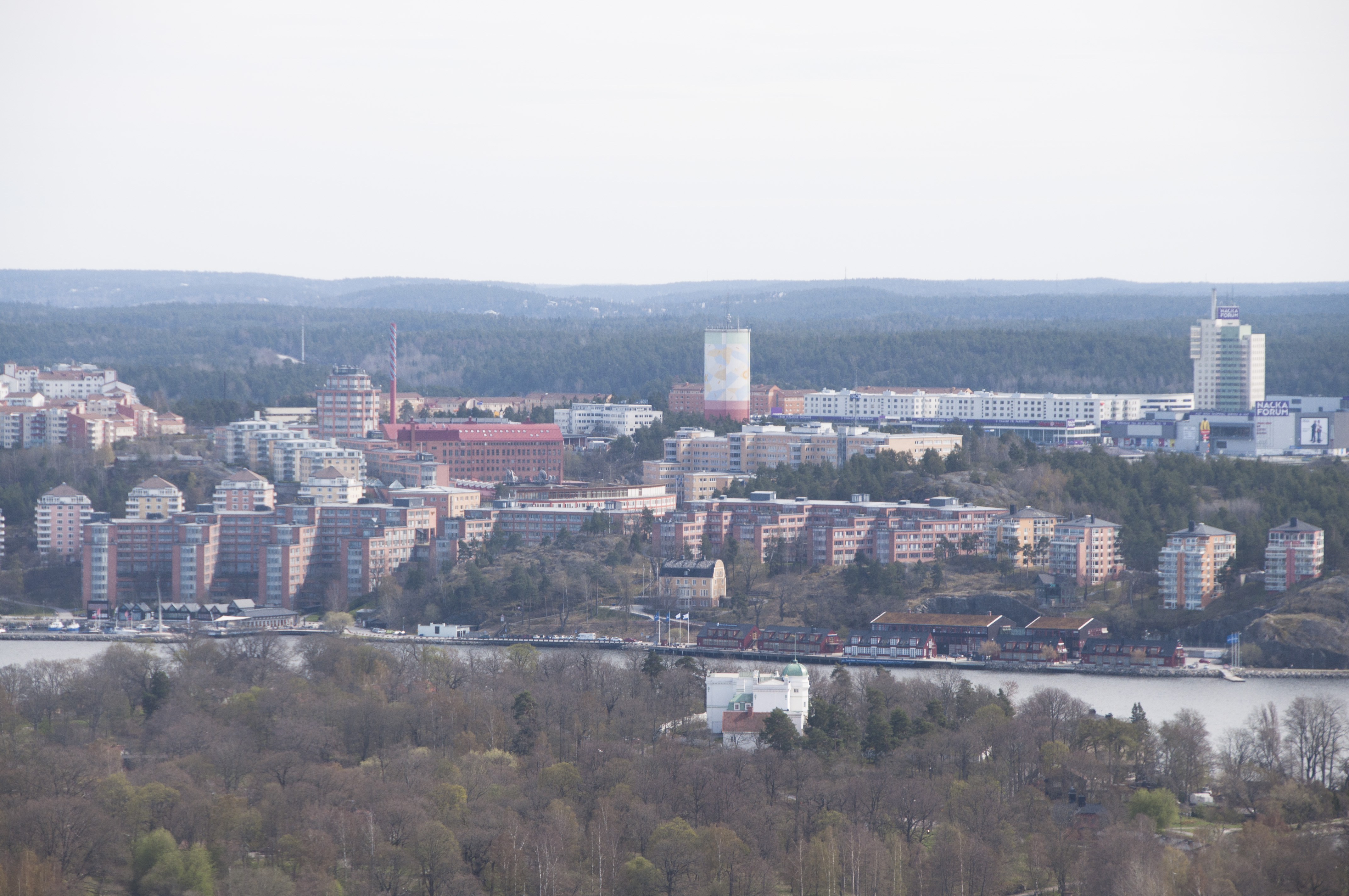 Nacka strand sett från Kaknästornet